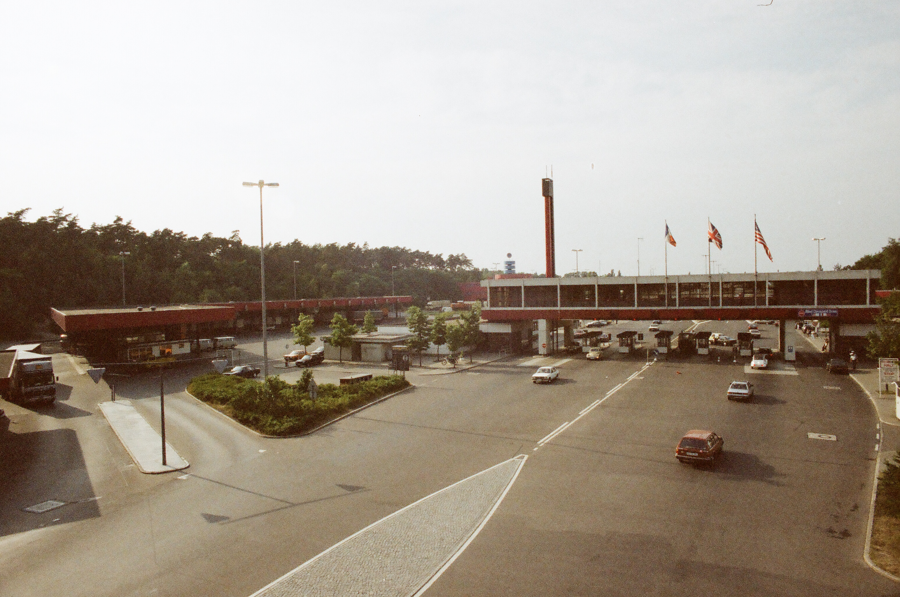 Checkpoint Bravo / Autobahnübergang Berlin/ Dreilinden